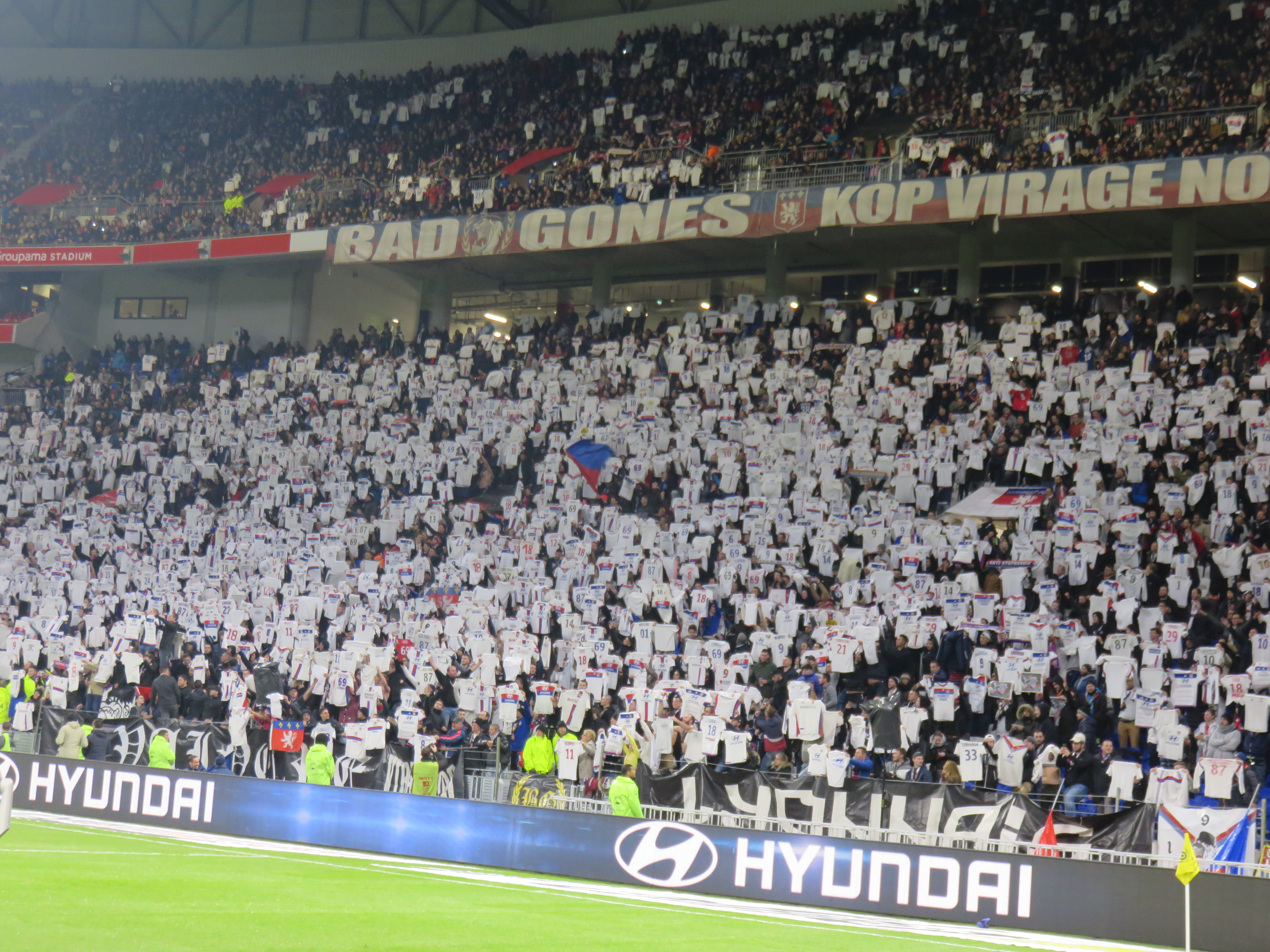 Un tifo réalisé par les Bad Gones en hommage à la célébration polémique de Nabil Fekir, qui avait brandit son maillot face aux supporters adverses lors du match ASSE-OL (0-5) de la journée précédente.